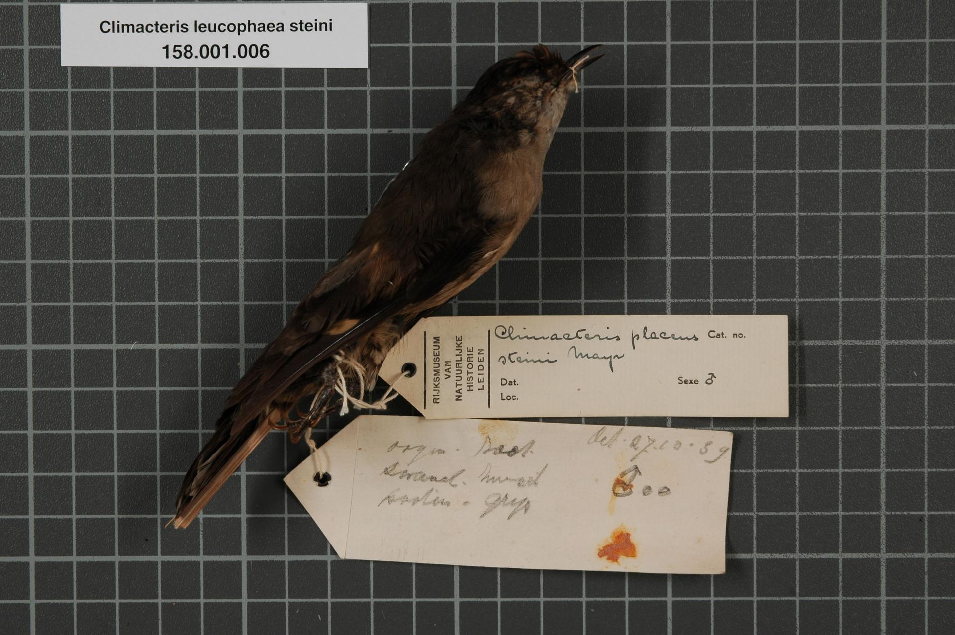 Climacteris leucophaea steini Mayr, 1936